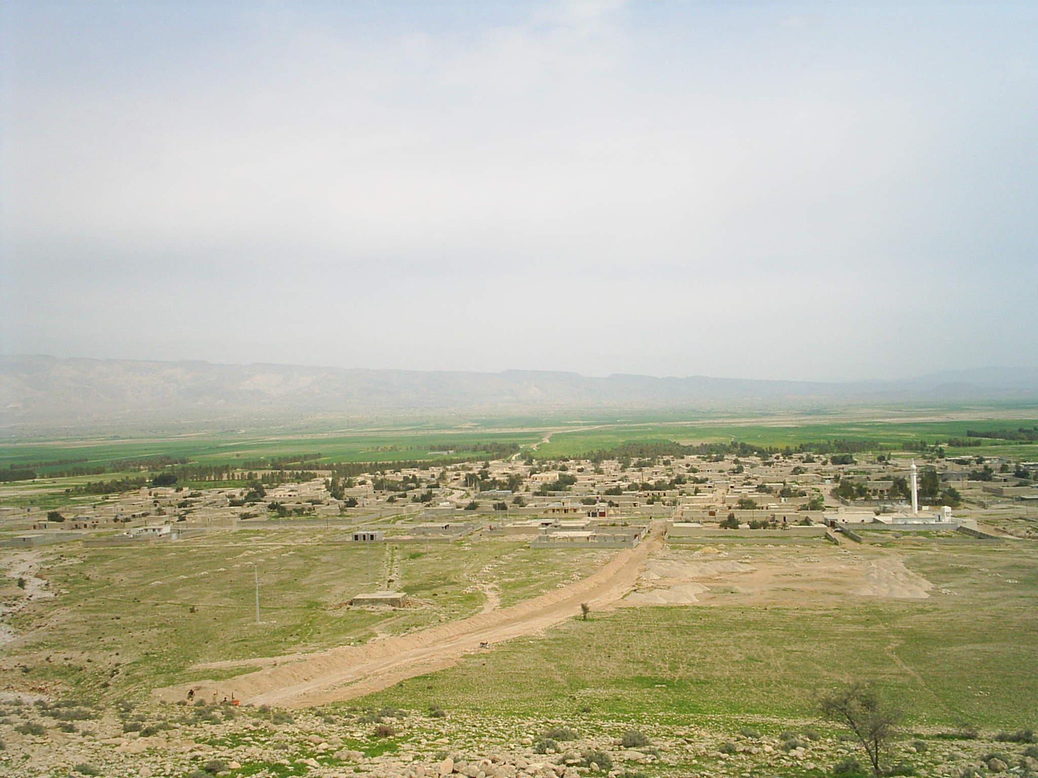 فارسی